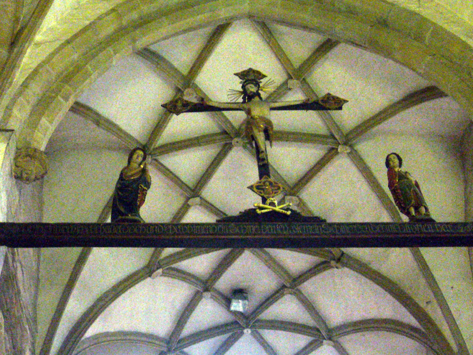 Víťazný oblúk s gotickou kalváriou v Konkatedrále sv. Mikuláša v Prešove